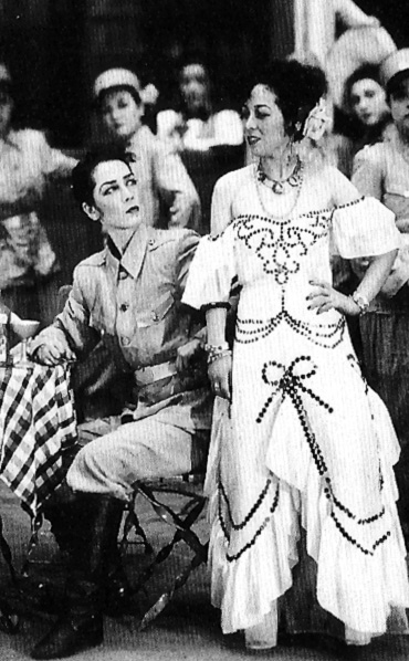 花組「再び君が胸に」舞台写真よりアップ。男役が越路吹雪(Koshiji Fubuki)、女役が深緑夏代(Fukamidori Natsuyo)